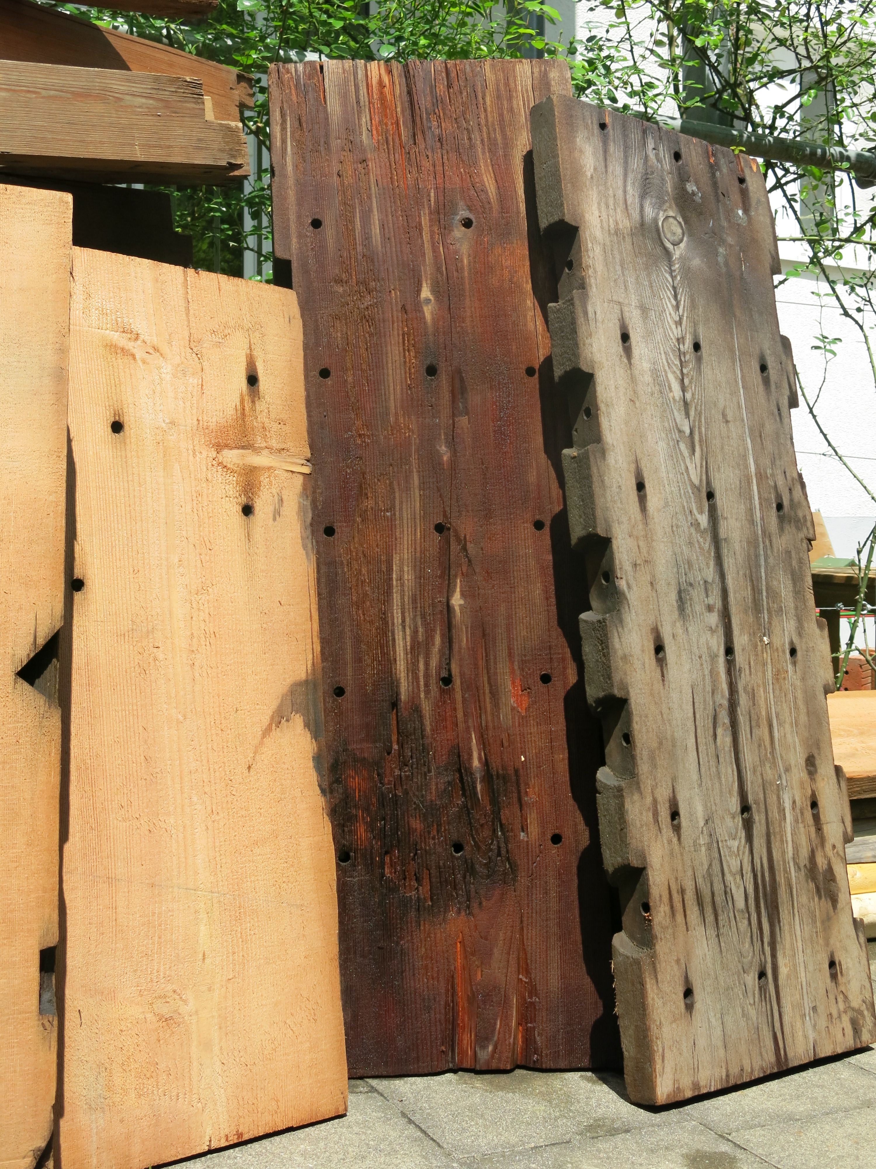 Holz von Pechkiefer, Reste des am 15.03.1983 gesprengten BR-Sendeturms in Ismaning; die Holzbohlen der Kiefer, bot. Pitch Pine, sind in München lagernde Reste des abgetragenen Sendetrums; die größeren Teile der Sendeturmkonstruktion wurden 1985 zum Bau des Wintergartens des Querbeetgartens genutzt. Das Holz für den Bau des Sendeturms gelangte 1933 von Kanada via Dampfschiff nach Europa